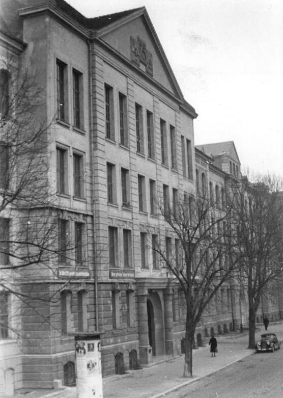 Zentralbild-Biscan Magdeburg Str-Sta. 22.1.1954 Hochschule für Schwermaschinenbau Das Gebäude der neuen Hochschule für Schwermaschinenbau in Magdeburg, wird heute noch von der Fachschule für Bauwesen benutzt, der Lehrbetrieb der Hochschule beginnt im Frühjahr 1954. Die Studenten leisten zur Zeit ihr Praktikum im Schwermaschinenbau.